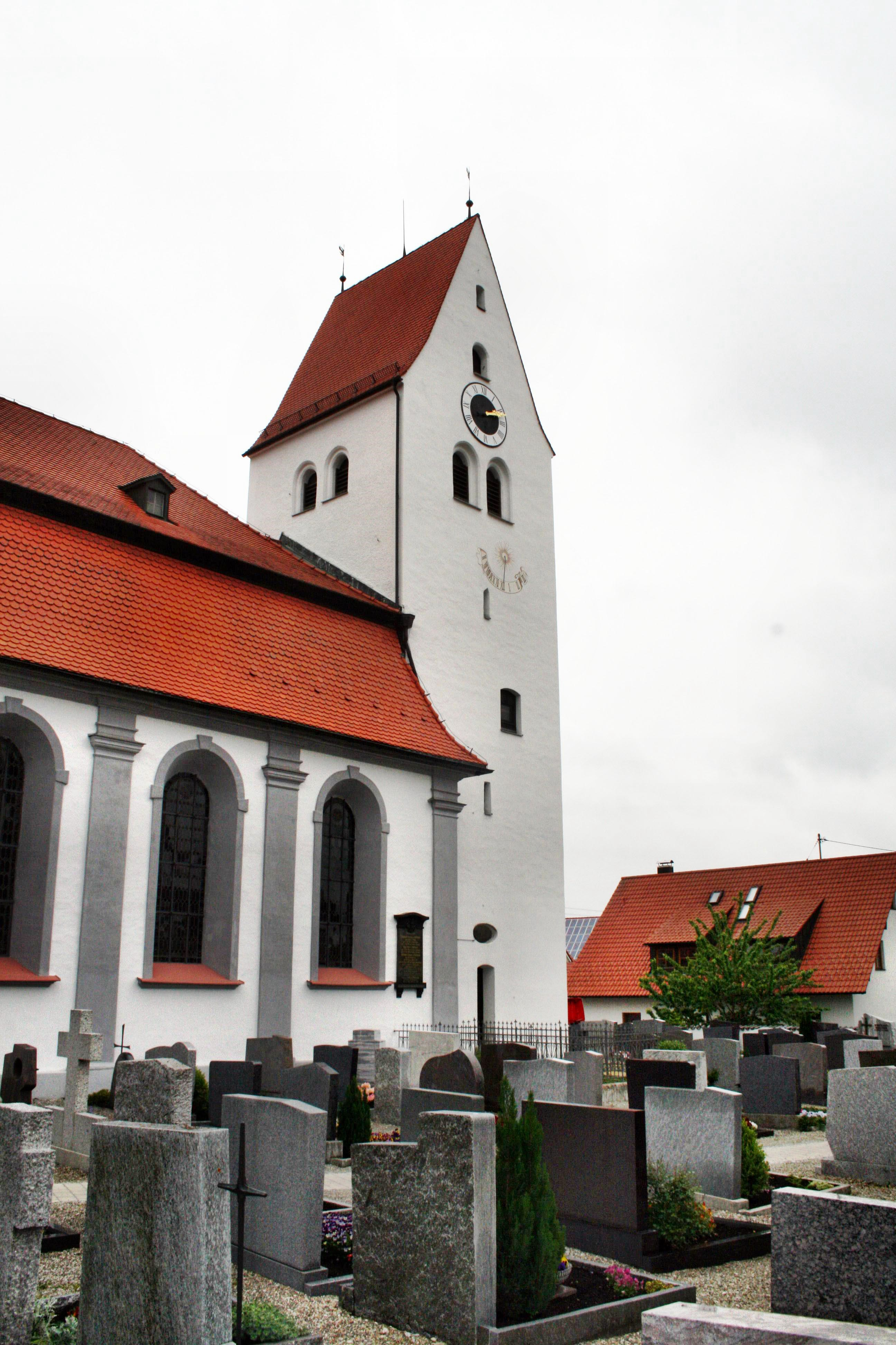 Friedhof und Kirchturm, St. Martin Memmingen-Steinheim